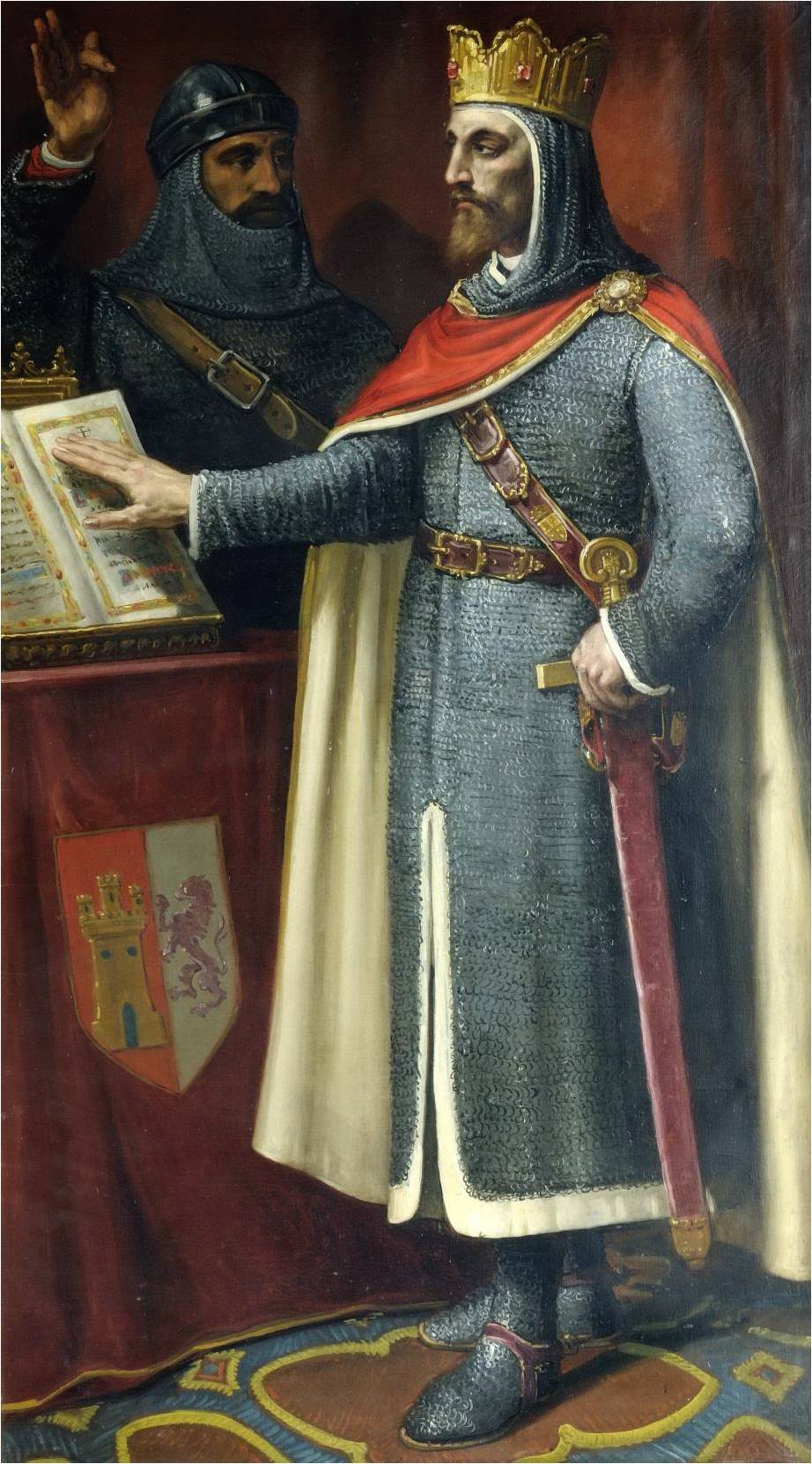 Retrato imaginario del rey Alfonso VI de León (1047-1109). Fue hijo del rey Fernando I de León y de la reina Sancha de León. Conquistó la ciudad de Toledo en el año 1085, aunque fue derrotado por los musulmanes en las batallas de Sagrajas y Uclés, que constituyeron sendas derrotas para las tropas leonesas y castellanas, falleciendo en la primera de ellas el heredero de Alfonso VI, el infante Sancho Alfónsez. Alfonso VI falleció en 1109, a los 62 años de edad y fue sucedido por su hija, Urraca I de León.